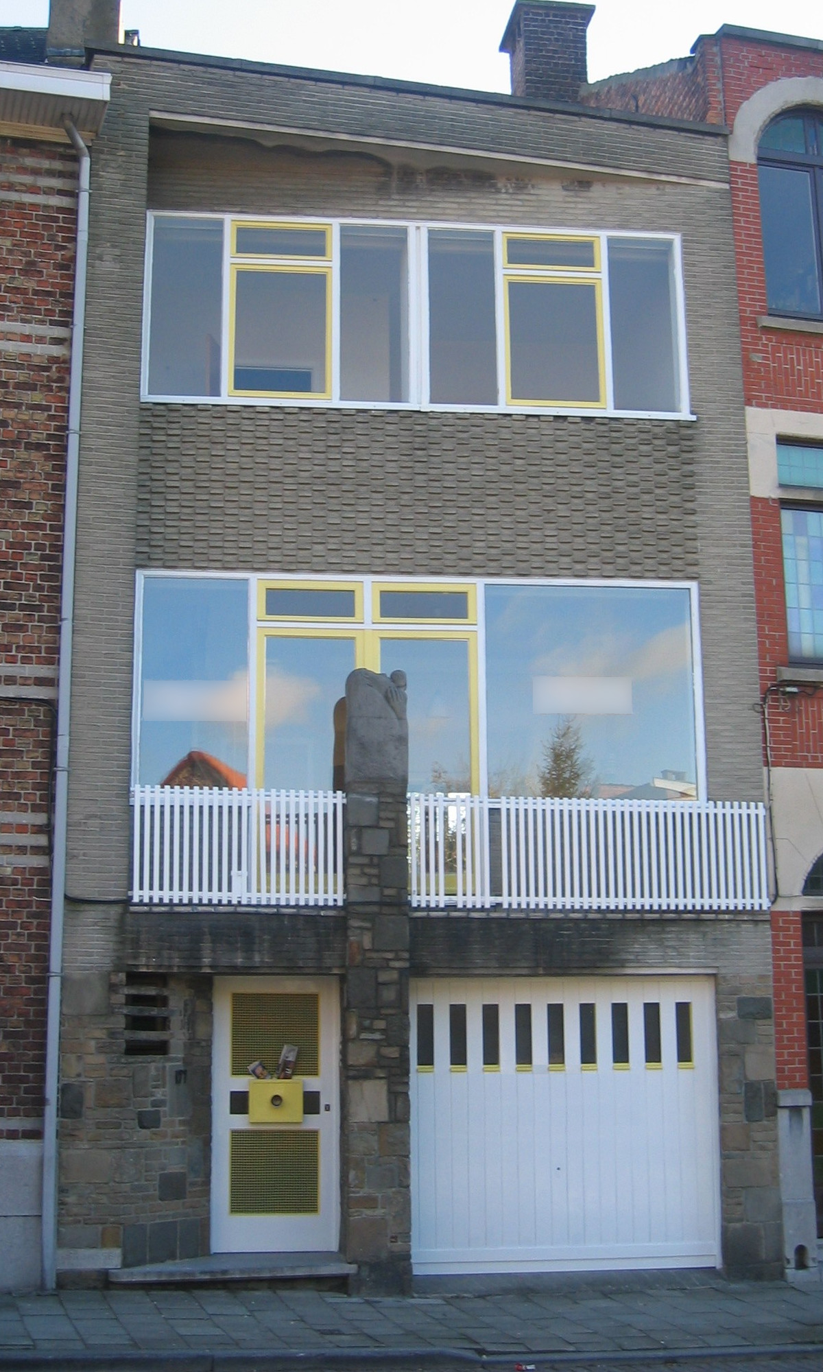 Maison unifamilliale rue de Heembeek. Avant rénovation, tel qu'imaginé par Josse Franssen